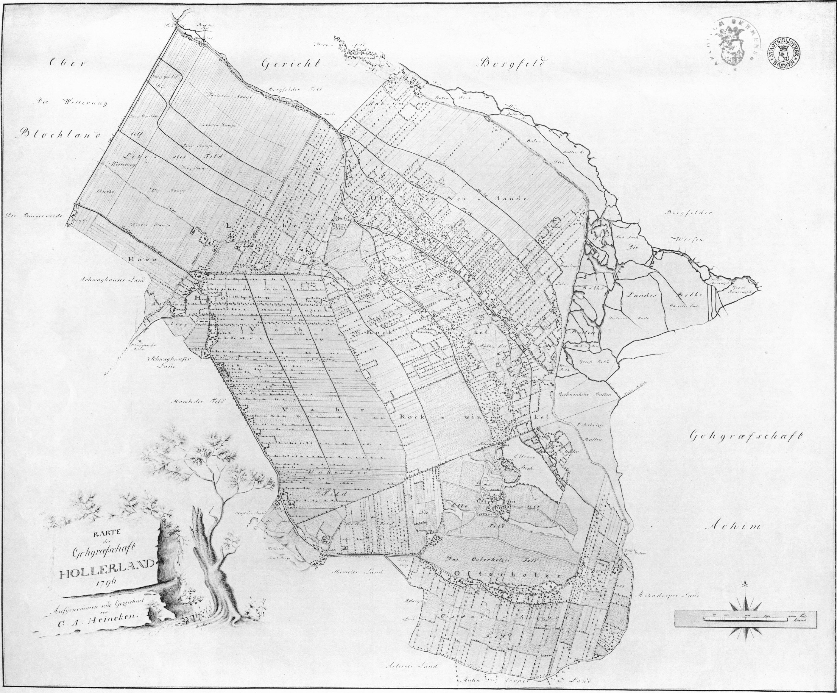 Originaö title: Karte der Gohgrafschaft Hollerland, aufgenommen und gezeichnet von C. A. Heineken 1796